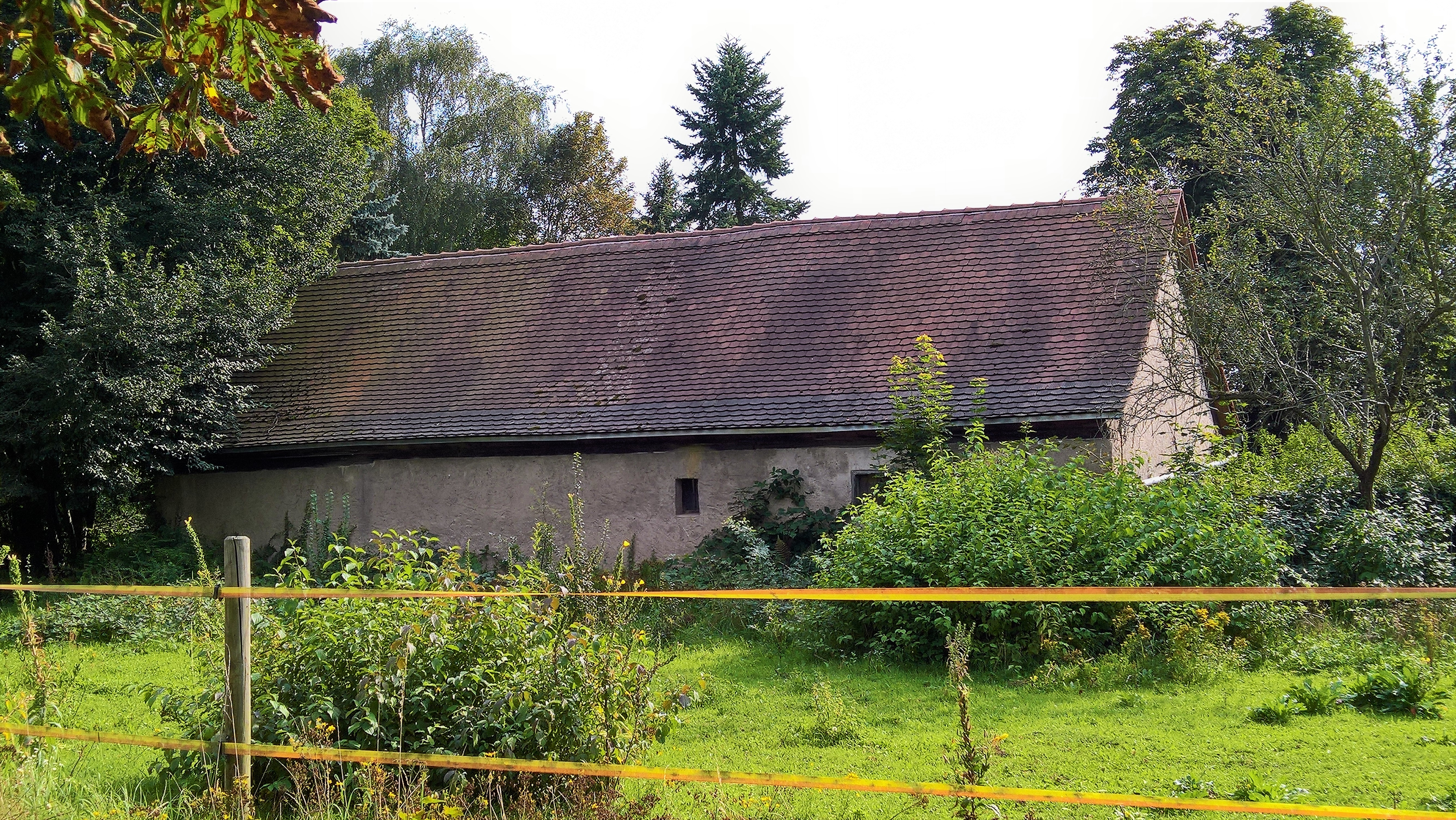 Die Scheune des Jagdzeugmeisterhauses, Kranichsteiner Straße 251, Blick von der Zeughauszufahrt